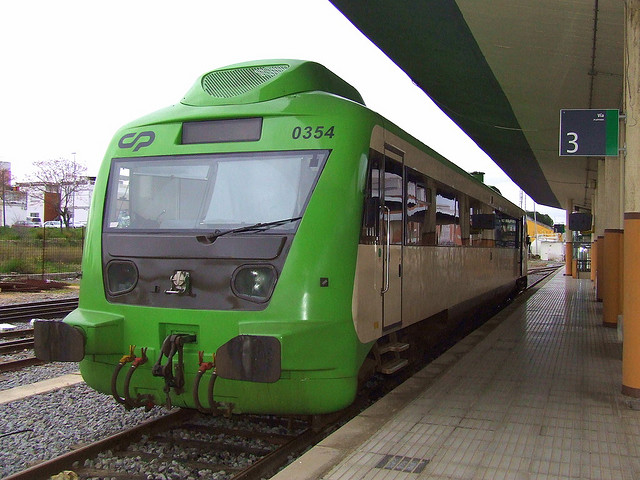 A automotora 0354 repousa em Badajoz depois de efectuar o Regional vindo do Entroncamento.